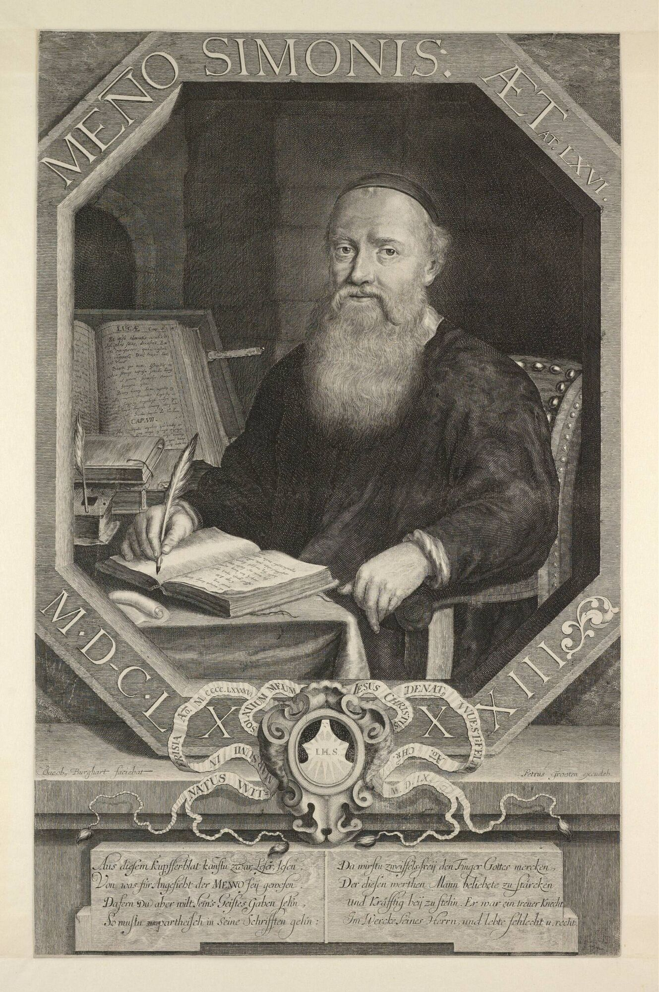 Porträt von Menno Simons. Kupferstich